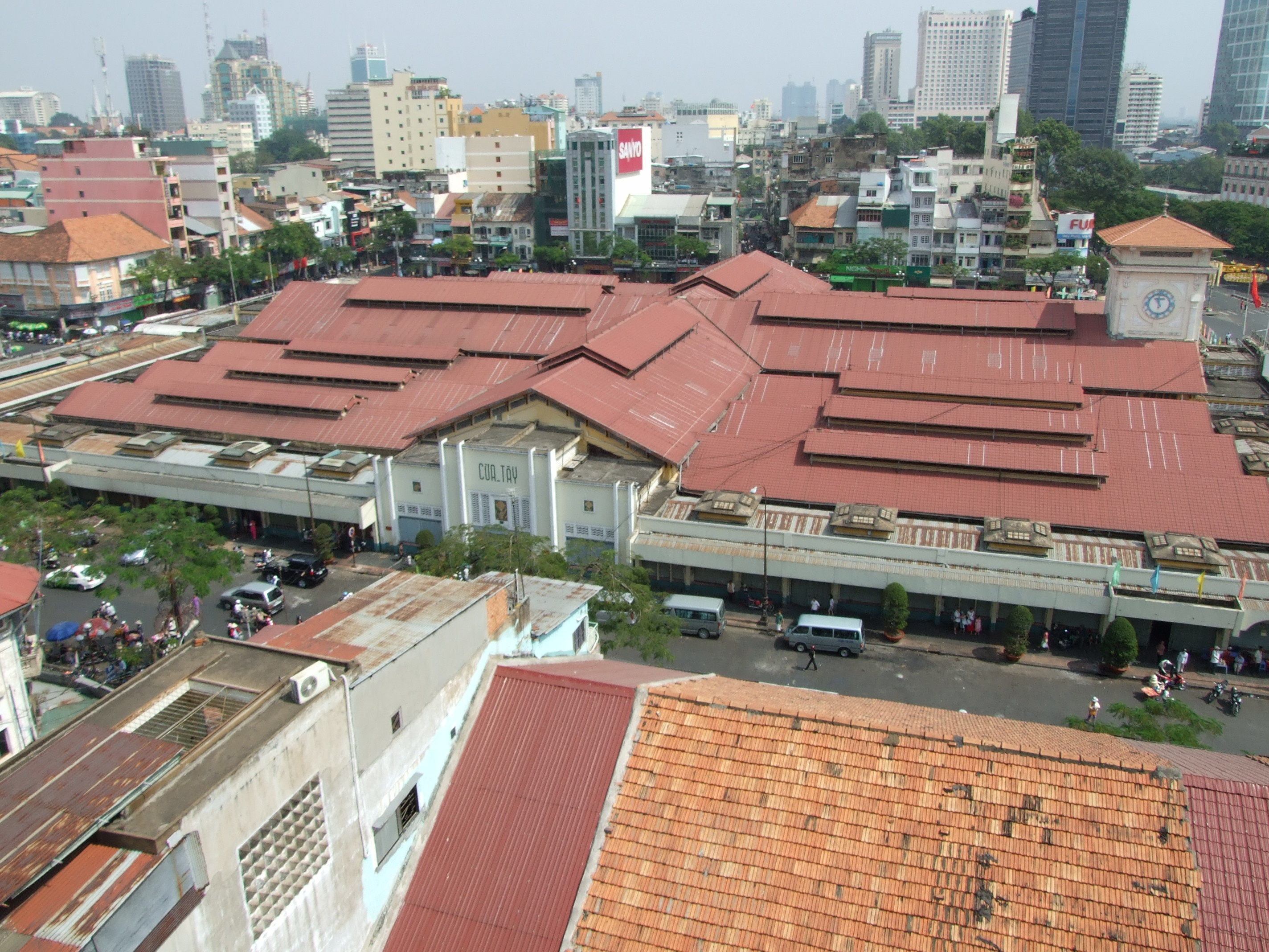 Vue du haut de mon hôtel, de ma chambre, du corridor ou de la terrasse au 10iem étage.